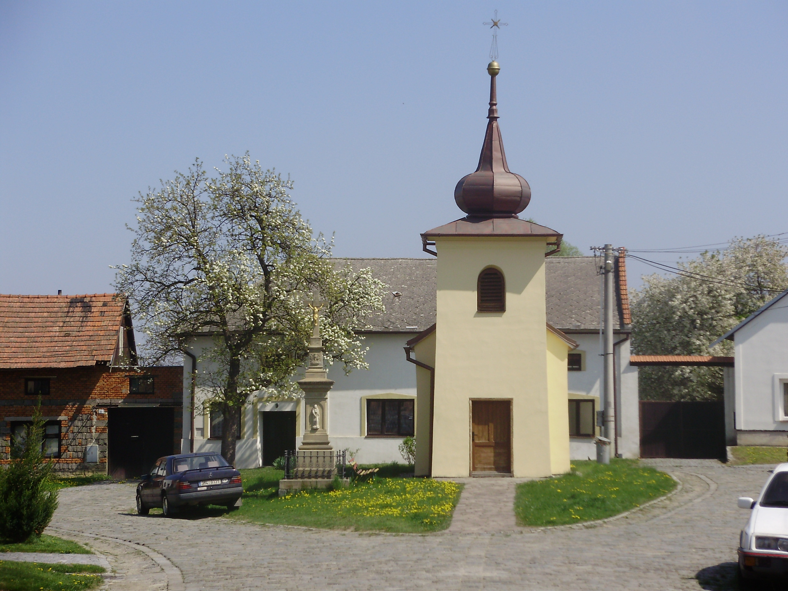 Kaplička Těšice